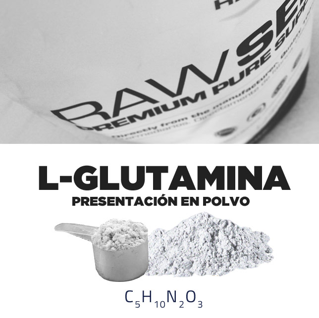 Presentación en polvo de suplemento de L-Glutamina